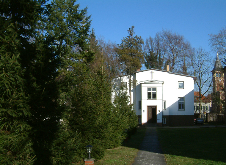 Evangelisch-Freikirchliche Gemeinde der Baptisten in Spremberg/NL im Land Brandenburg, Deutschland